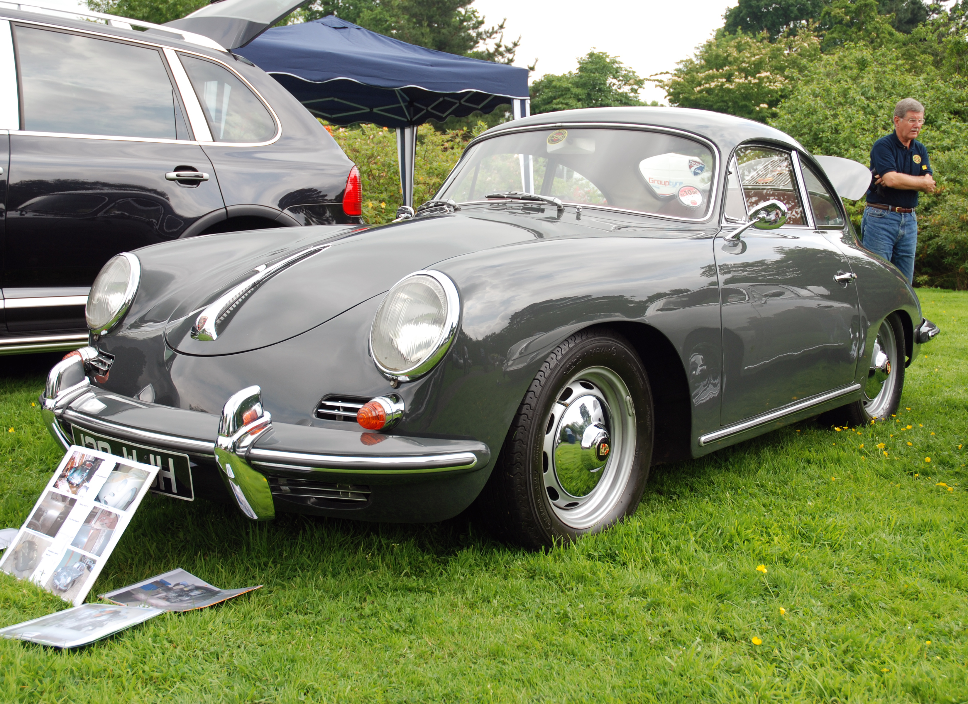 Borde Hill,June 2008